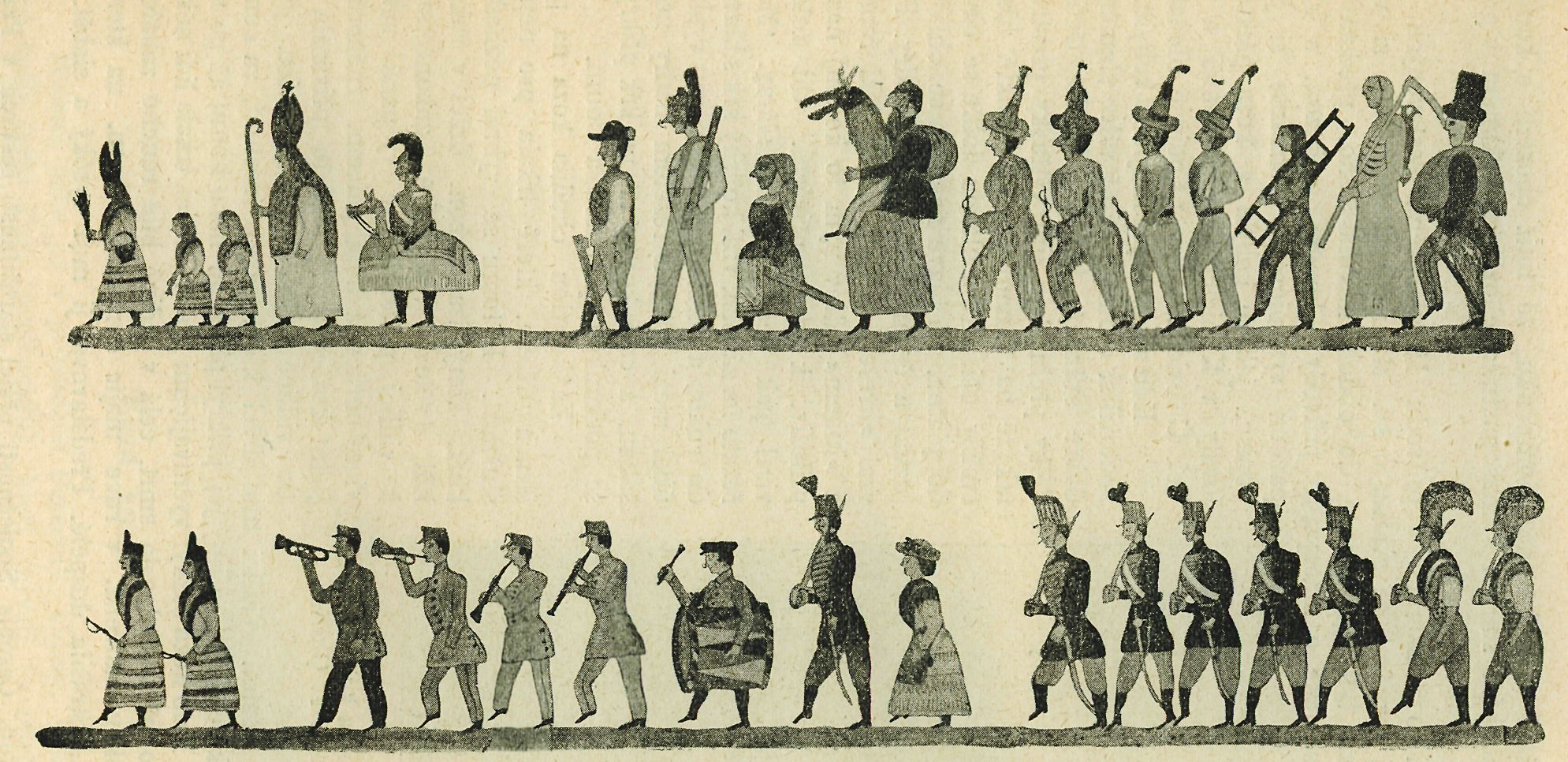 Ряженые в масках, гусары, лошадь, еврей в процессии Святого Николая в Sloupnice. 1840